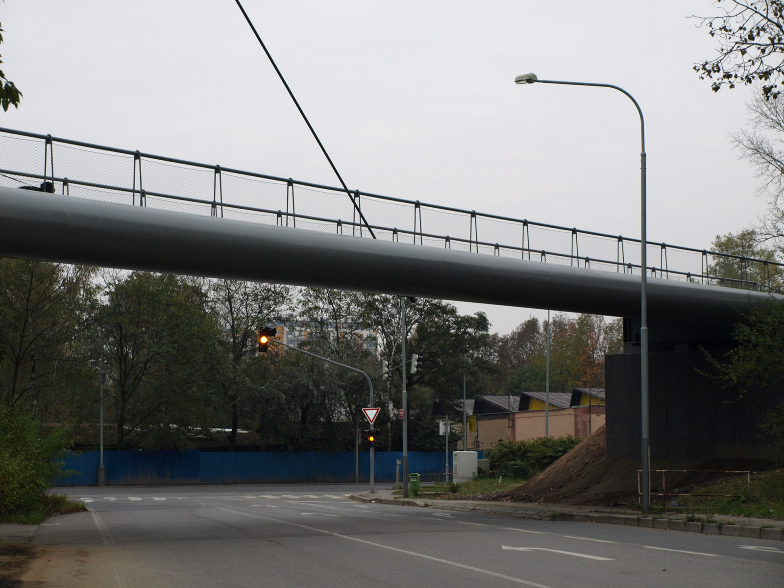 Cyklostezka Praha 9 z 22.10.2009